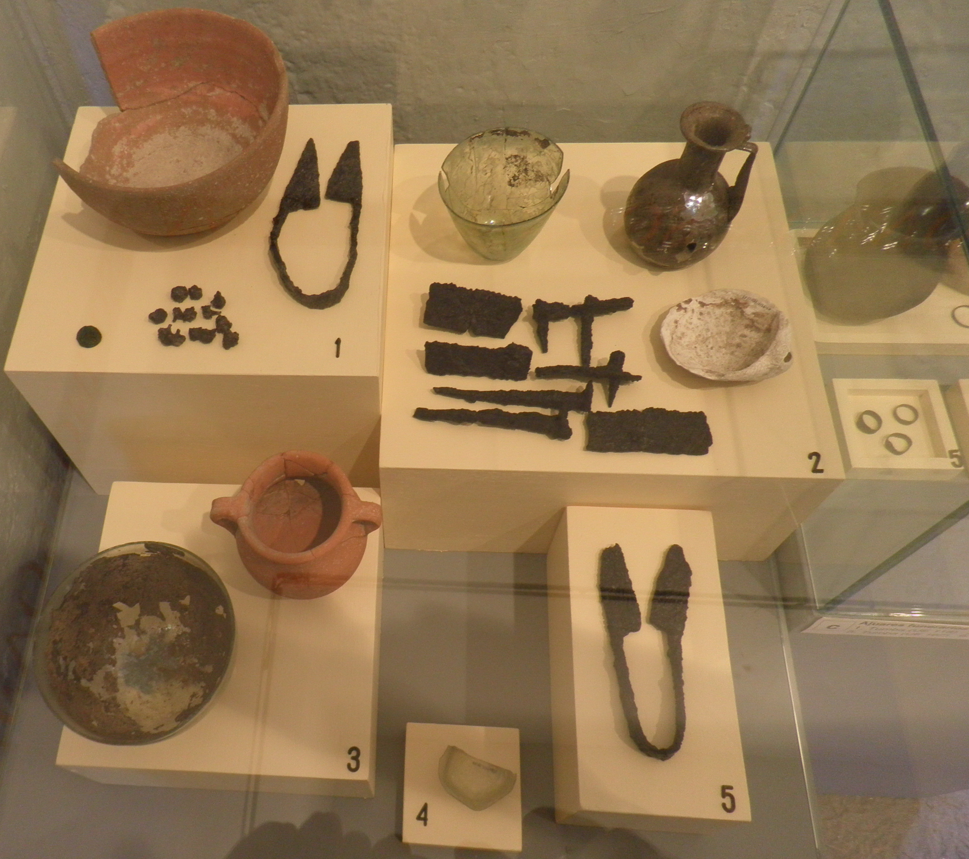 Ajuares funerarios procedentes de las excavaciones en la necrópolis tardorromana